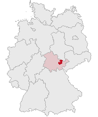 Saale-Holzland-Kreis, Thuringia, Germany